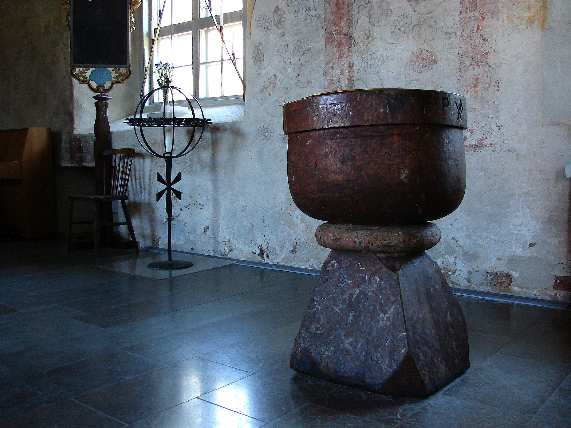 Døbefont fra Sankt Laurentii Kirke, Falkenberg, Halland, Sverige